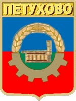 герб города Петухова